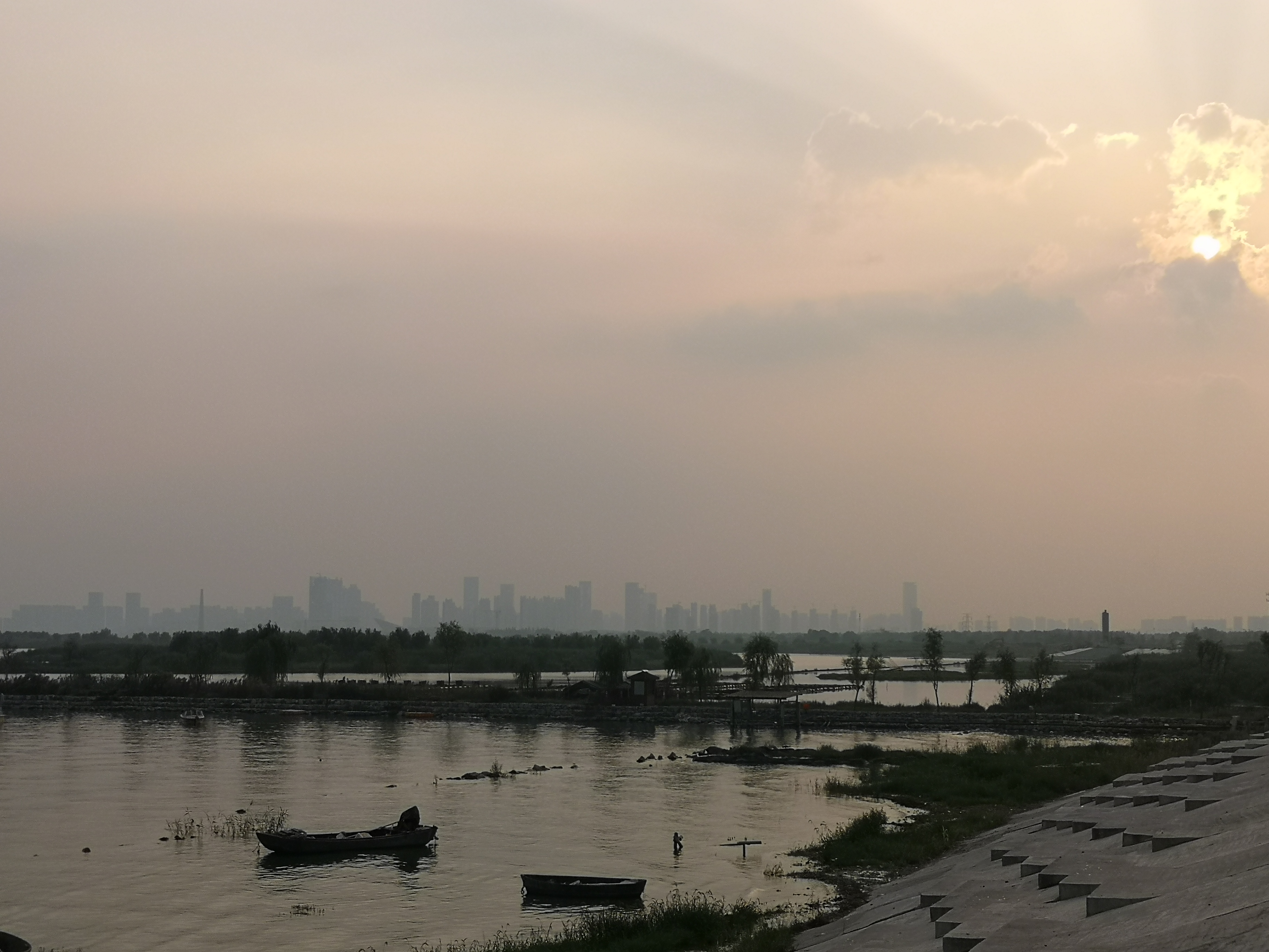 中文（中国大陆）: 远眺合肥滨湖核心区